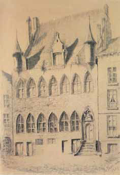 Haus Utenhovensteen am Vrijdagmarkt in Gent, 1839 niedergelegt